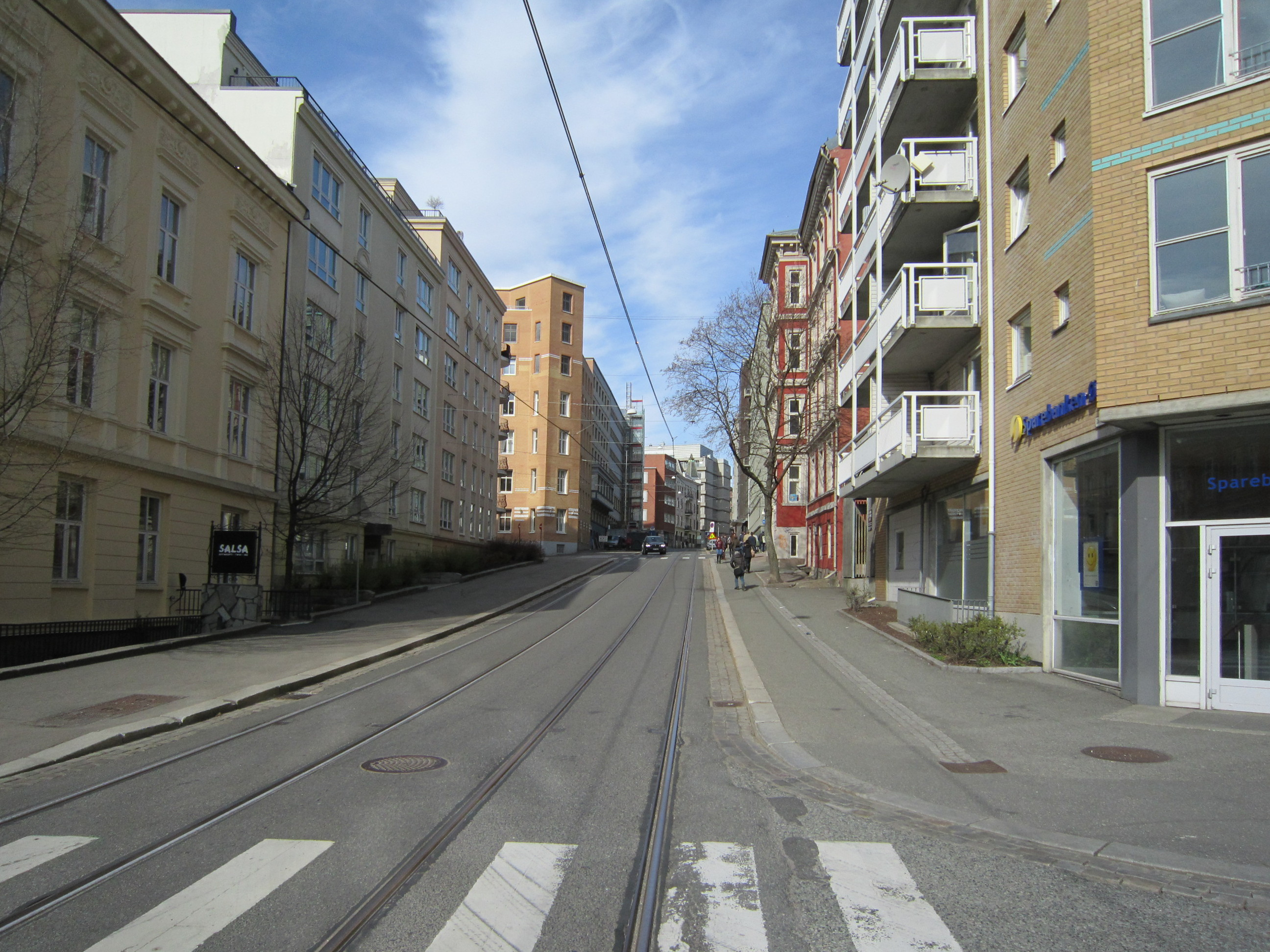 Oppover i Cort Adelers gate